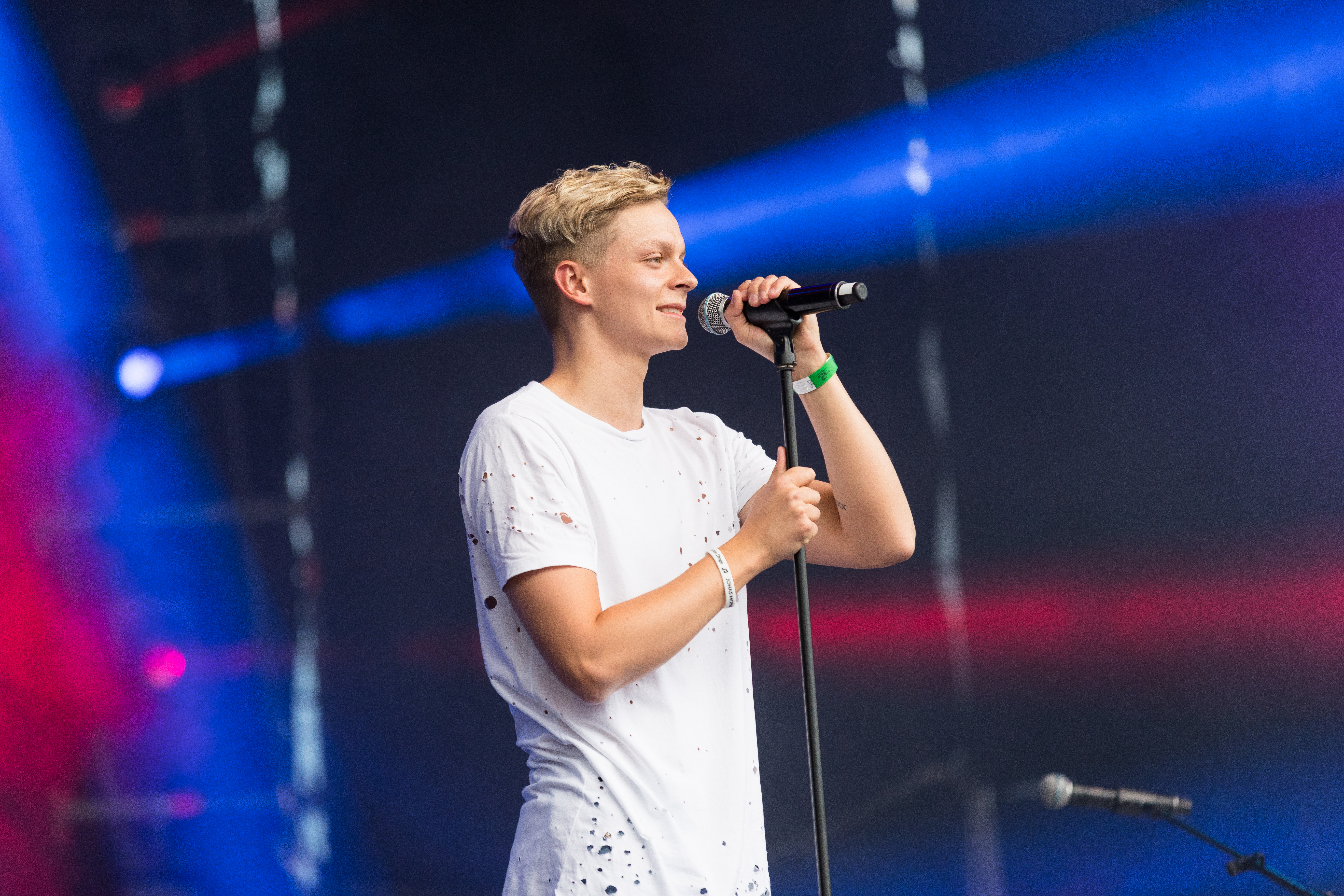 Jonas Monar during Schlossgrabenfest at , Darmstadt, Hessen, Germany on 2017-05-28, Photo: Sven Mandel